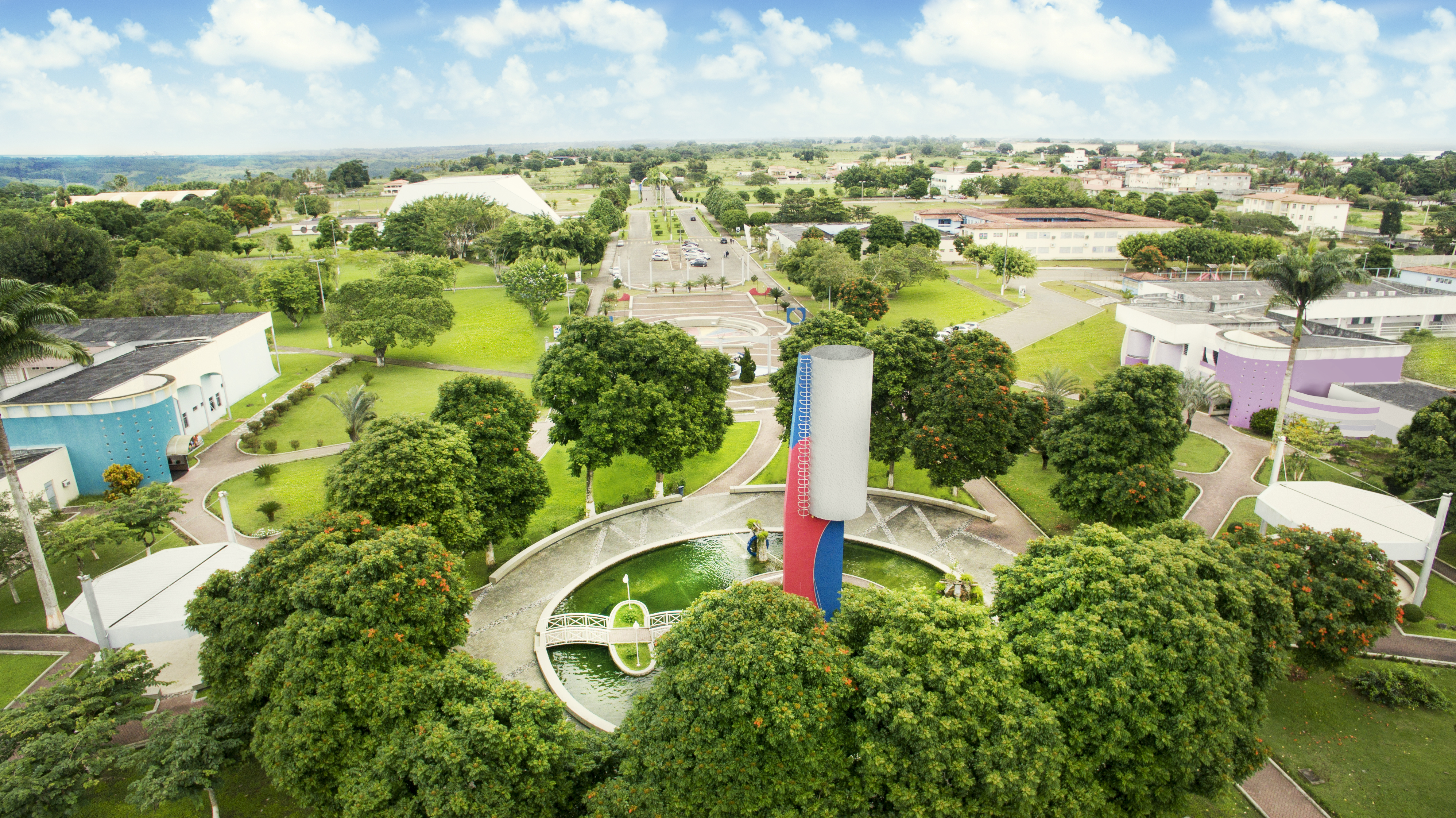 Foto geral aérea